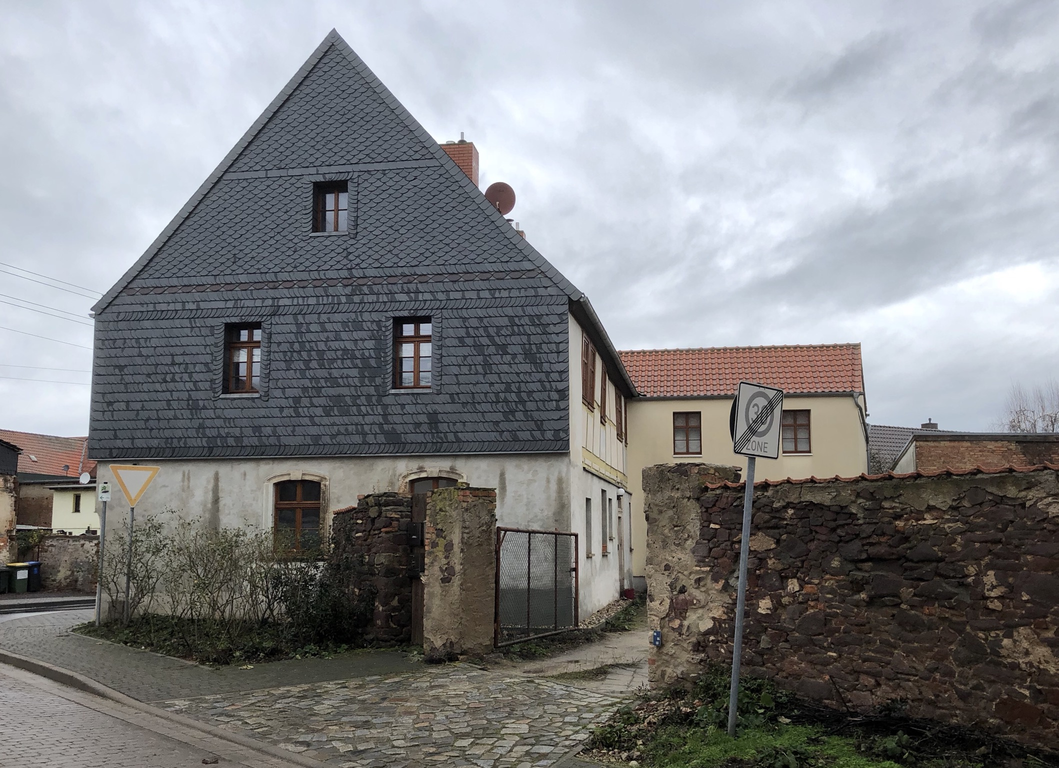 Dahlenwarslebener Straße 1 Hohenwarsleben